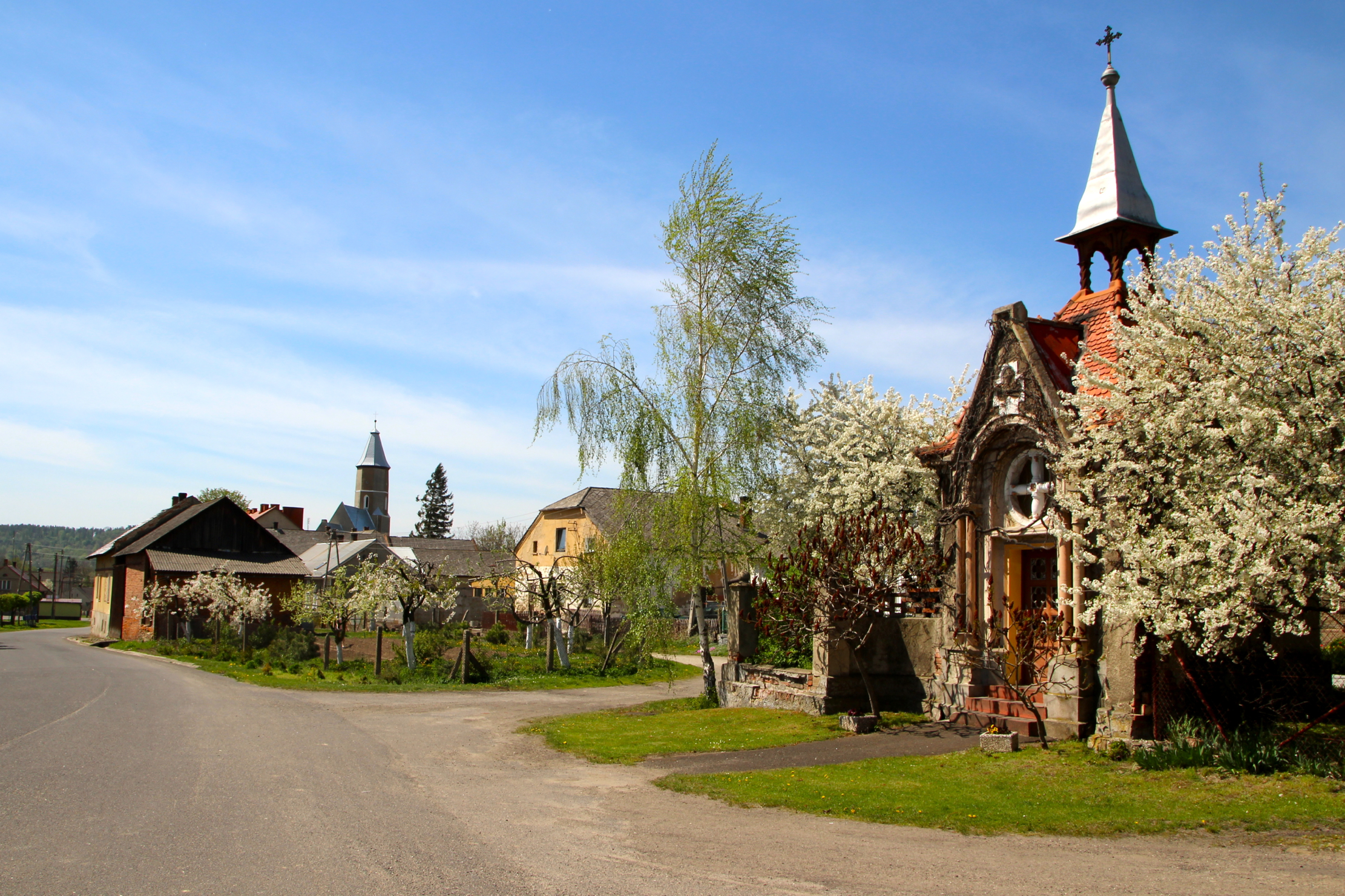 Bliszczyce – wieś w Polsce położona w województwie opolskim, w powiecie głubczyckim, w gminie Branice.